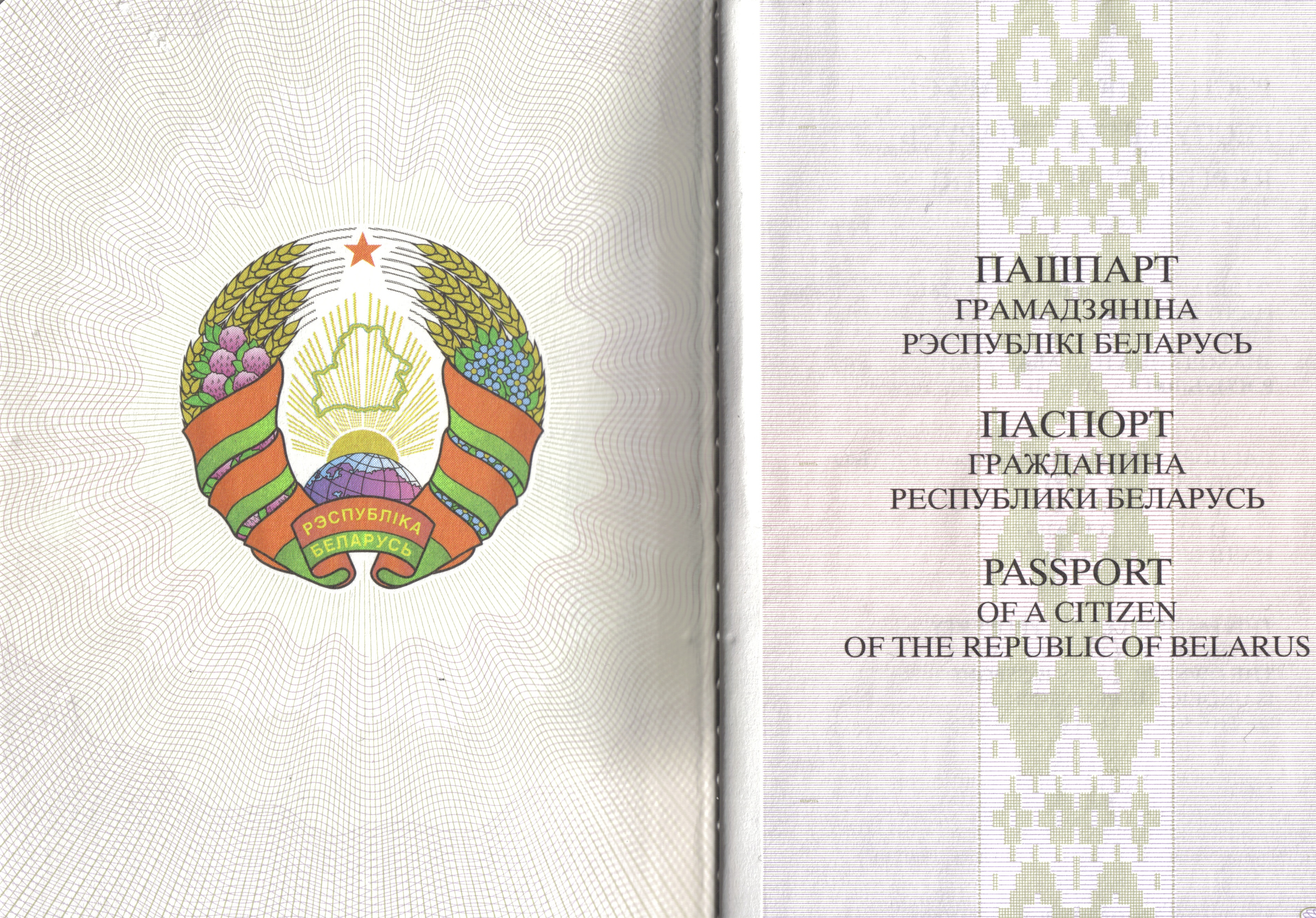 Пашпарт. Рэспубліка Беларусь. 2010 год. Першая старонка.